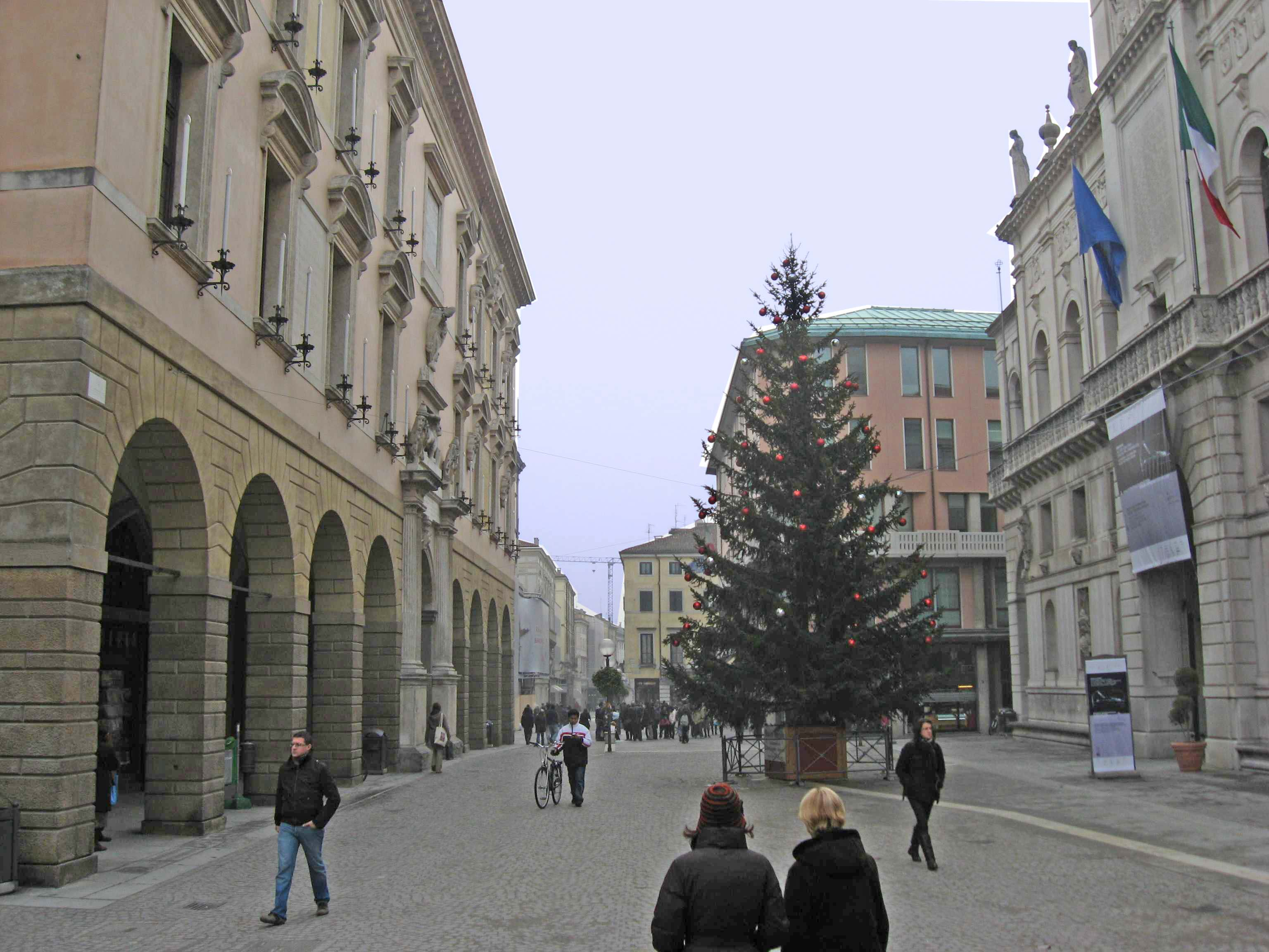 Listòn Padova (ritocco)